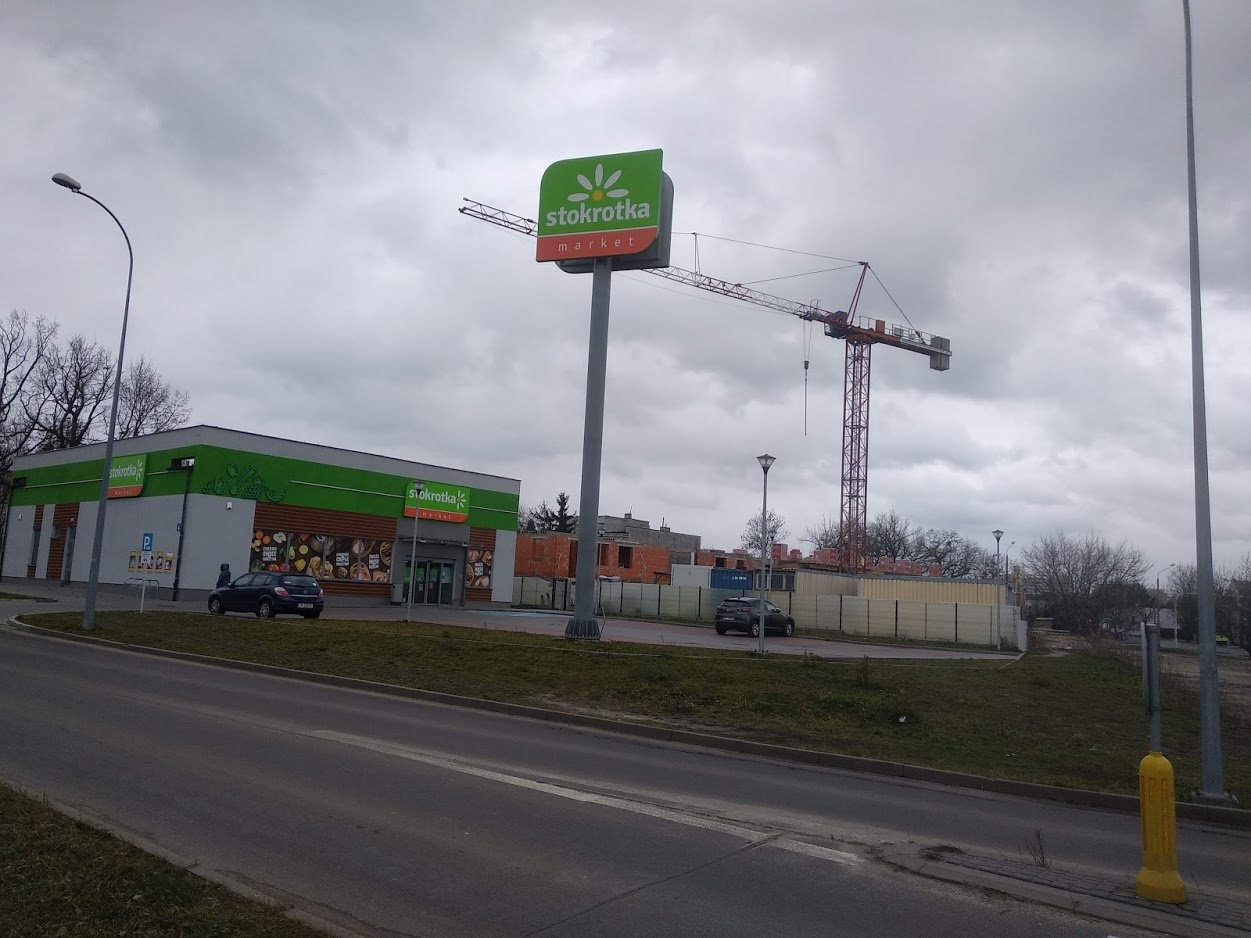 Budowa nowego bloku na ul. Okreżnej (2020)